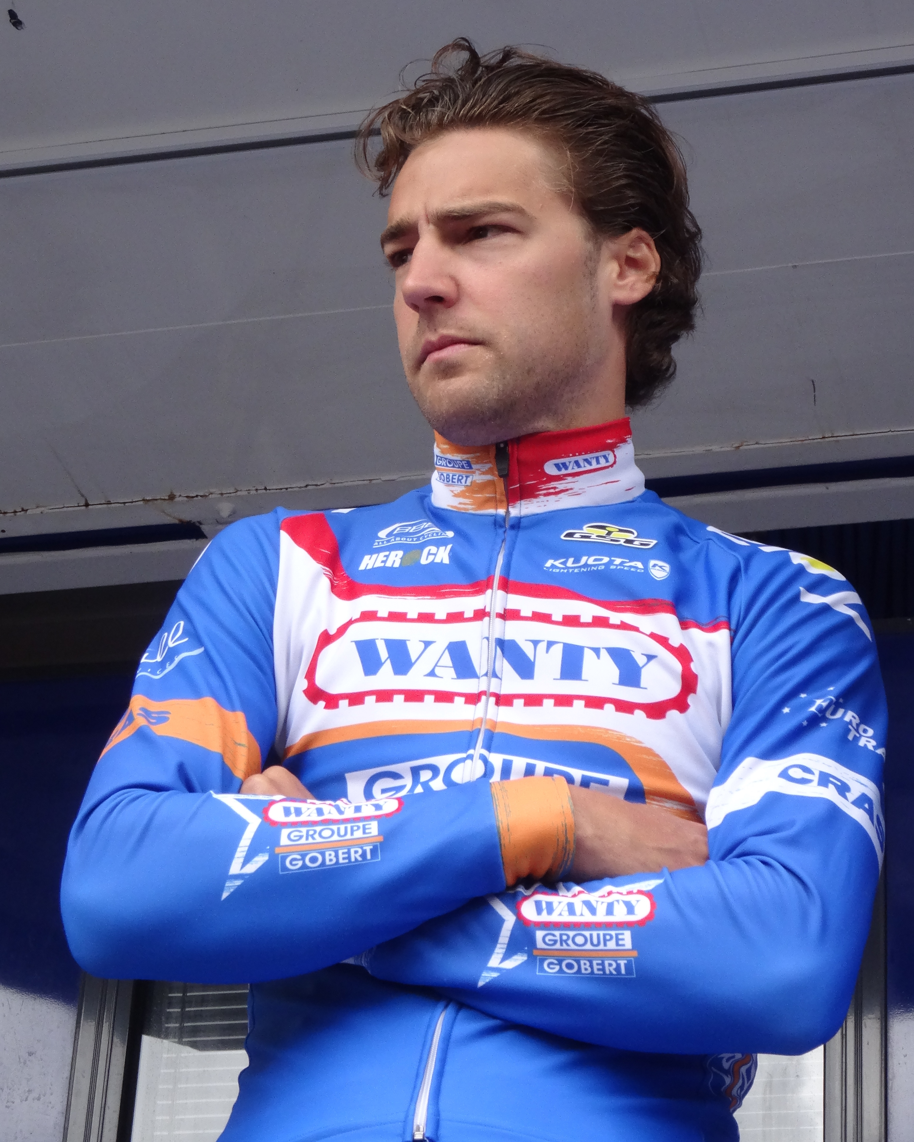 Reportage photographique réalisé le mercredi 7 mai 2014 au départ de la première étape de l'édition 2014 des Quatre jours de Dunkerque à Dunkerque, Nord, Nord-Pas-de-Calais, France. Depicted person: Laurens De Vreese Depicted team: Wanty-Groupe Gobert